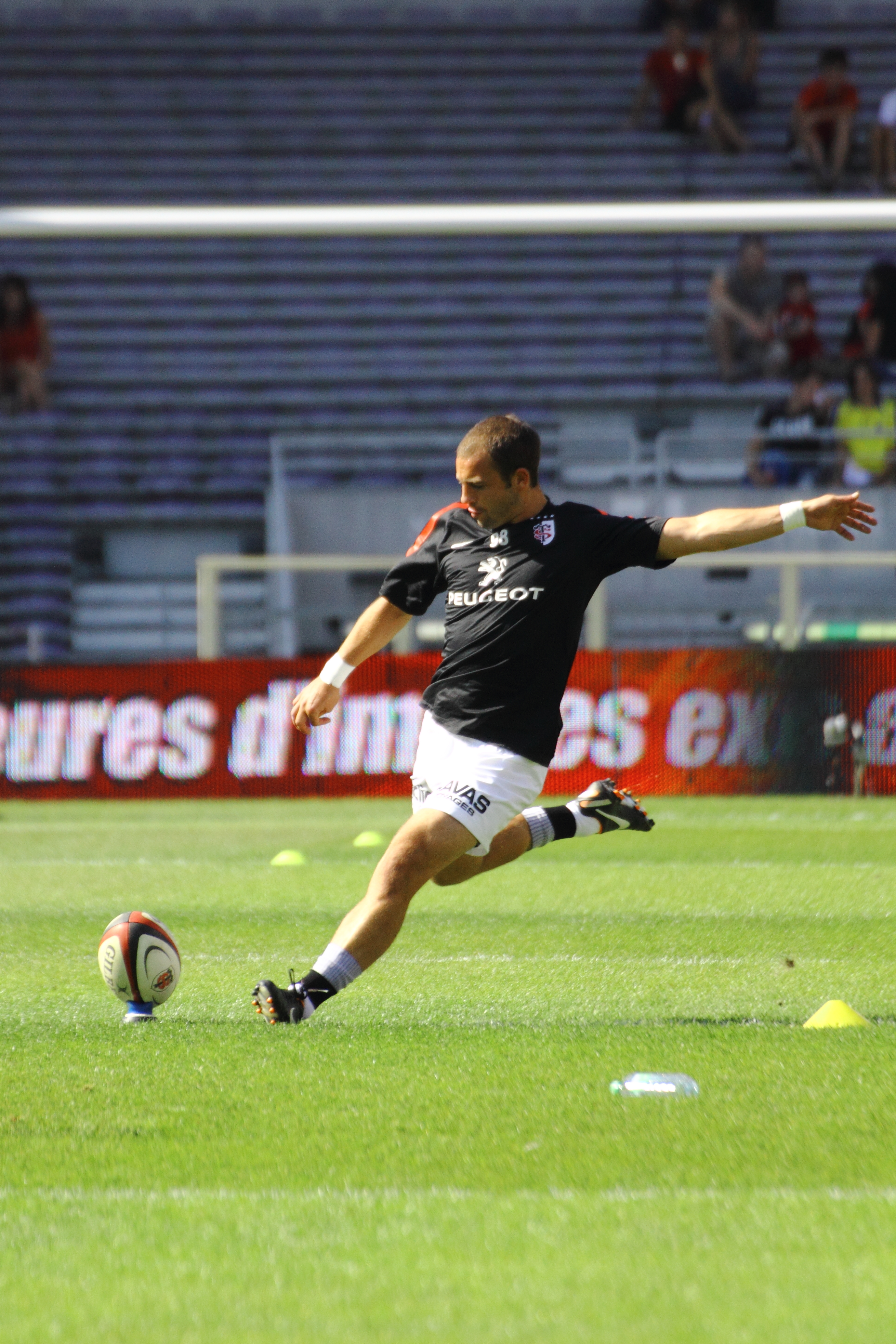 Match de TOP14 entre le Stade toulousain et l'ASM (1 octobre 2011)